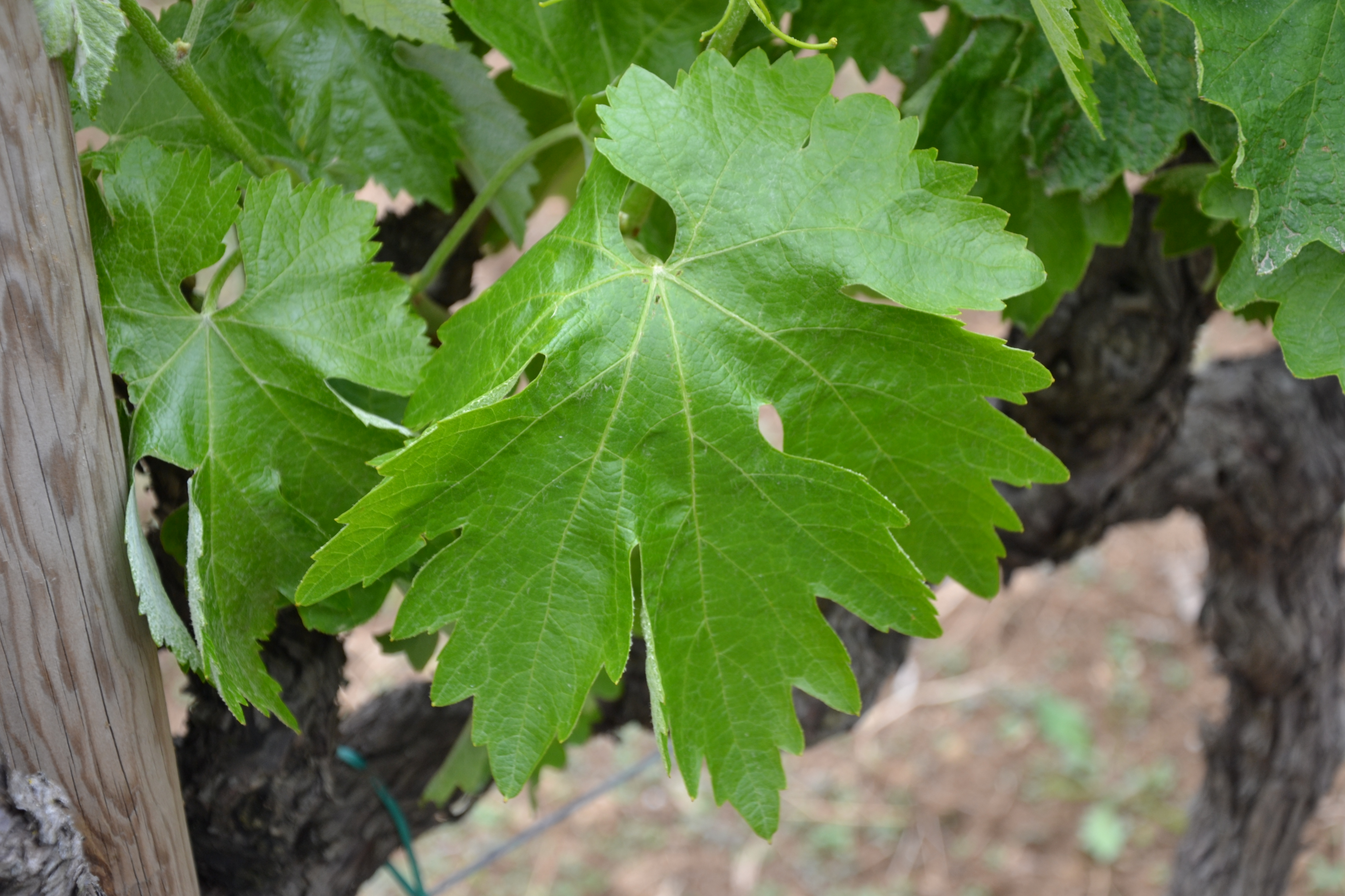 feuille de cépage macabéo